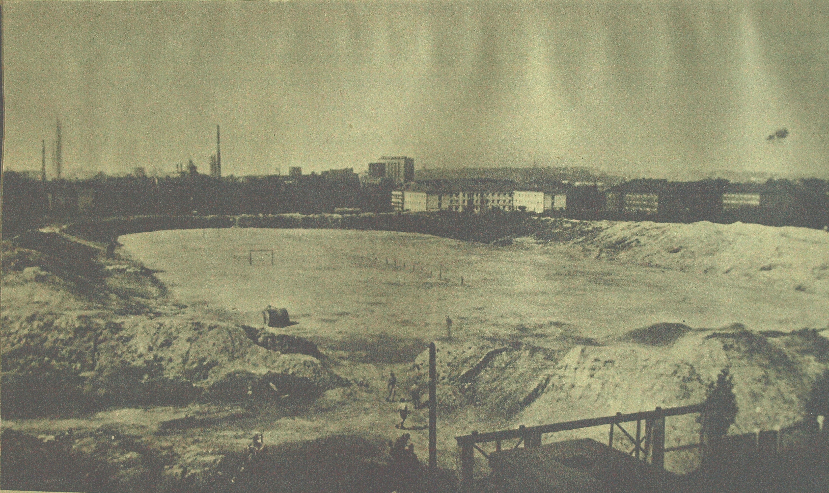 Stadion Ruchu w chwili budowy